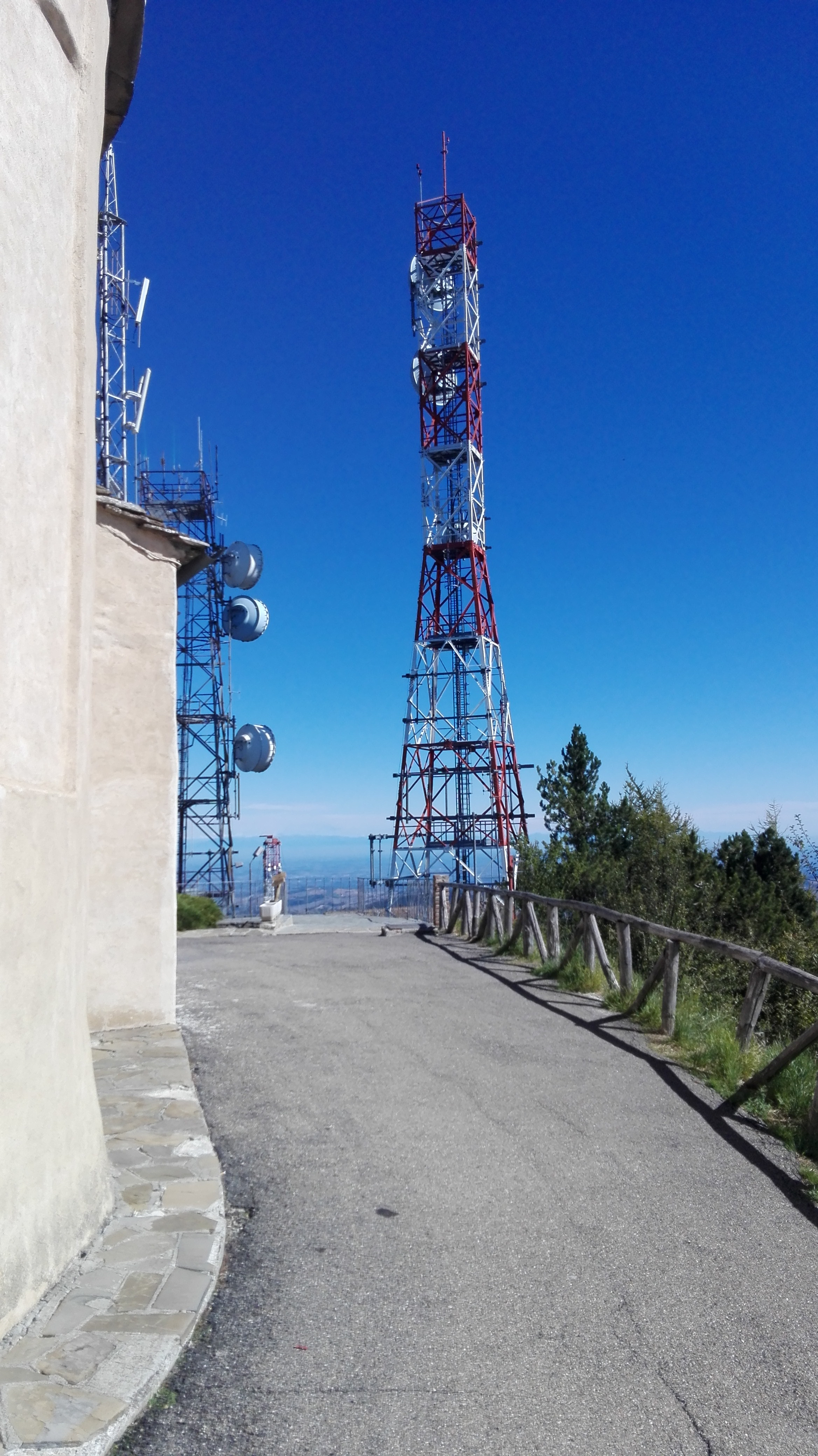 Alcuni Trasmettitori situati sulla vetta del Monte Penice (Vicino al Santuario)